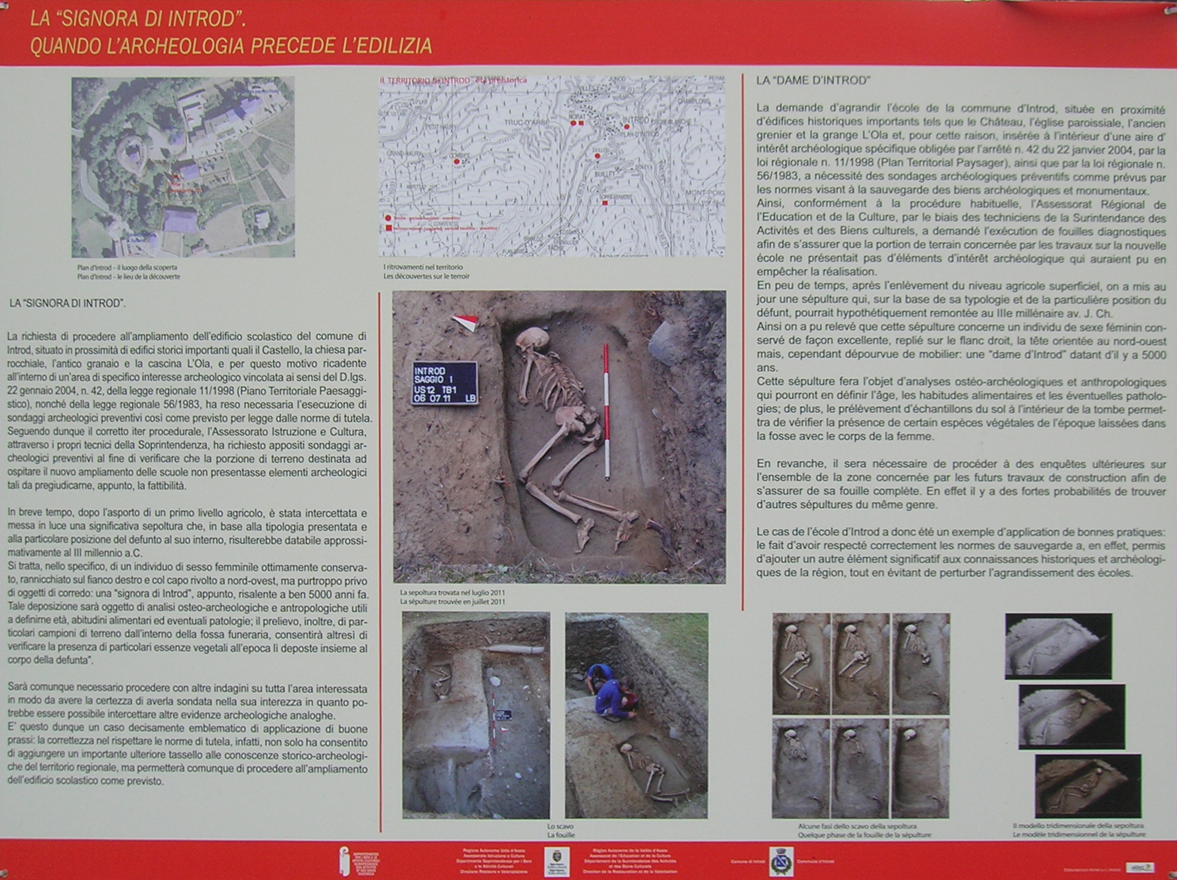 Pannello degli scavi archeologici d'Introd, nel luogo in cui è stata trovata la Signora d'Introd, nei pressi del Castello. Introd, Valle d'Aosta, Italia.